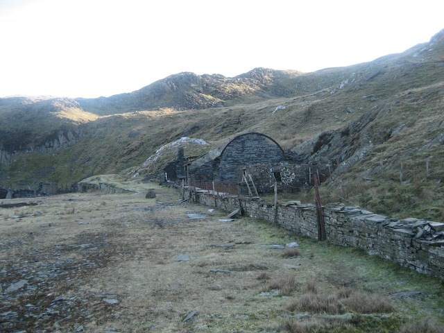 Croesor quarry